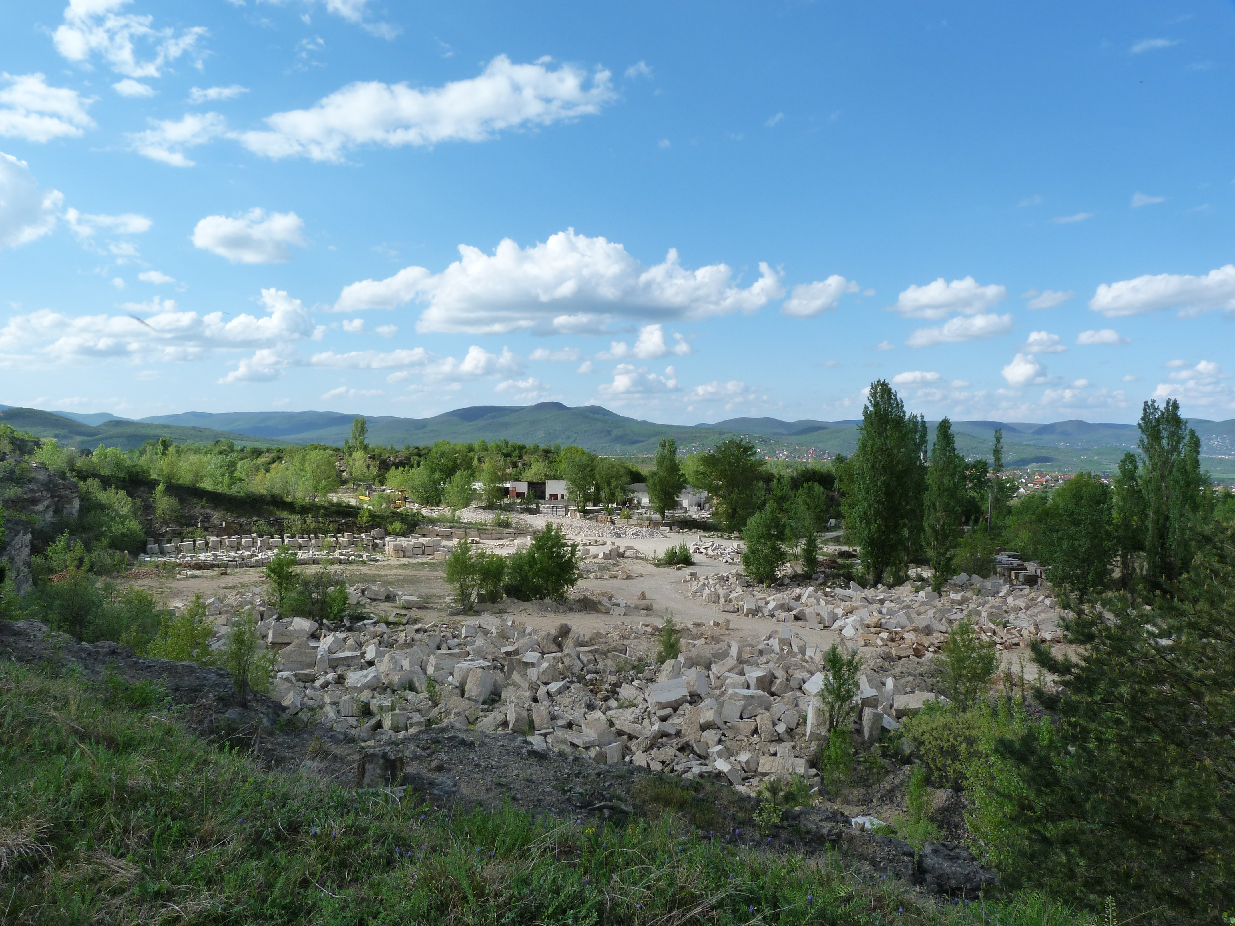 A budakalászi mészkőbánya